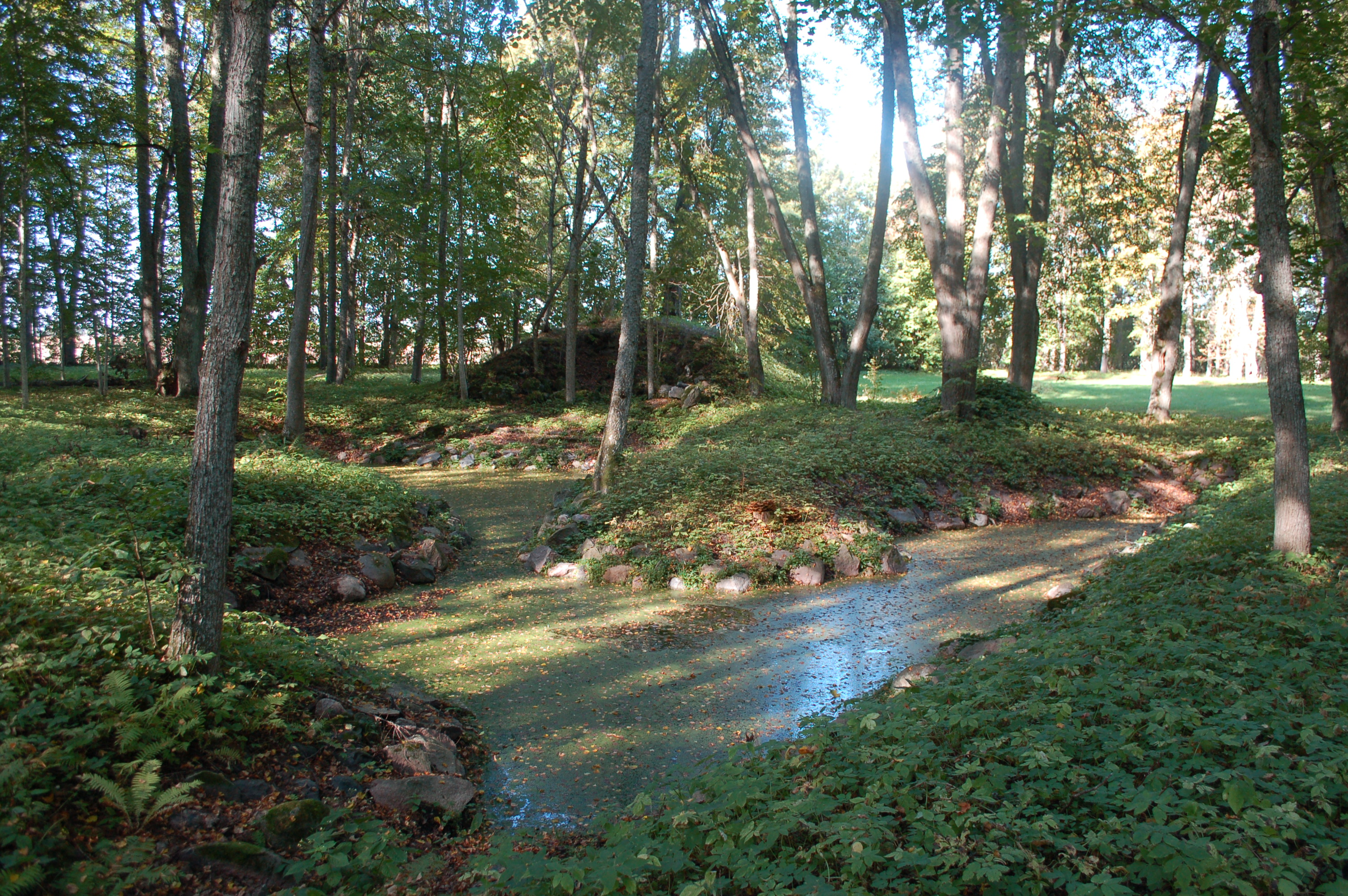 Pargigrott Autor: Mart Raudsaar